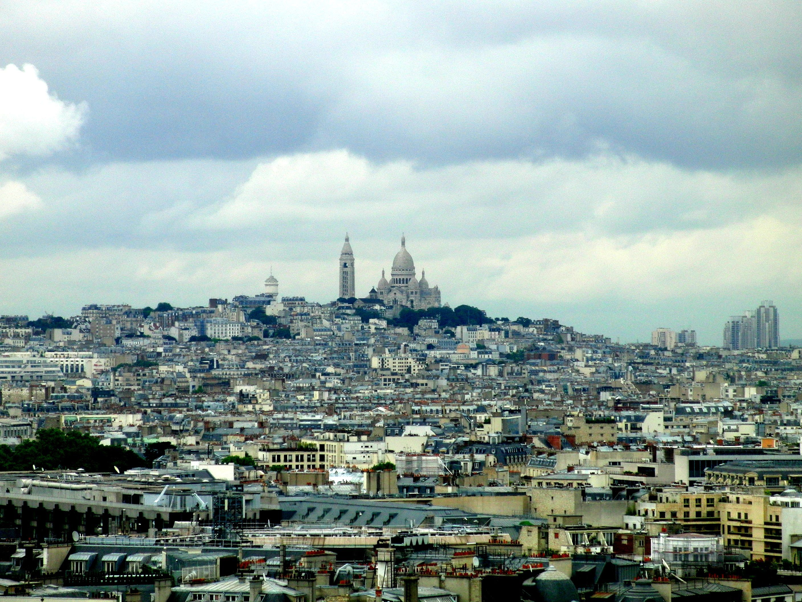 Montmartre und Sacré-Cœur vom Triumphbogen